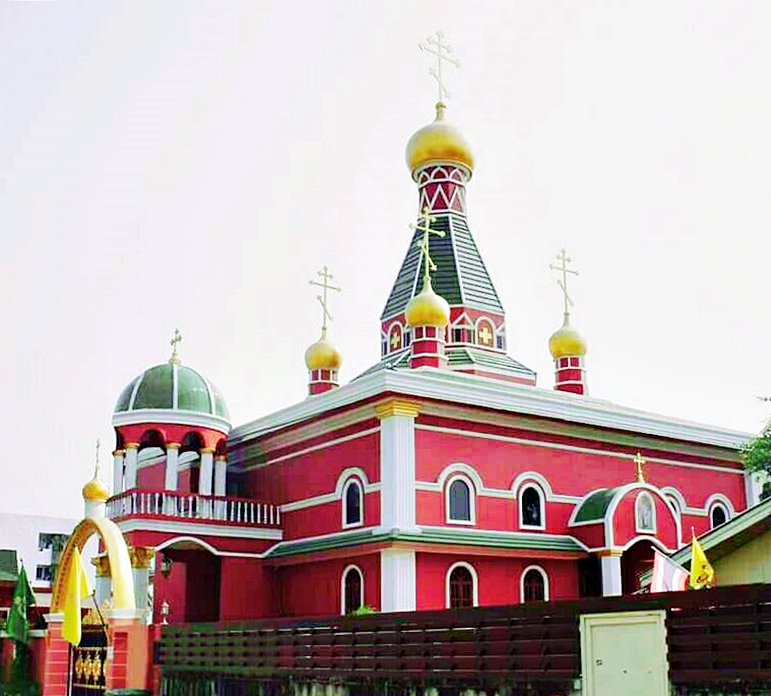 อาสนวิหารแห่งนักบุญนิโคลัสฯ กรุงเทพมหานคร